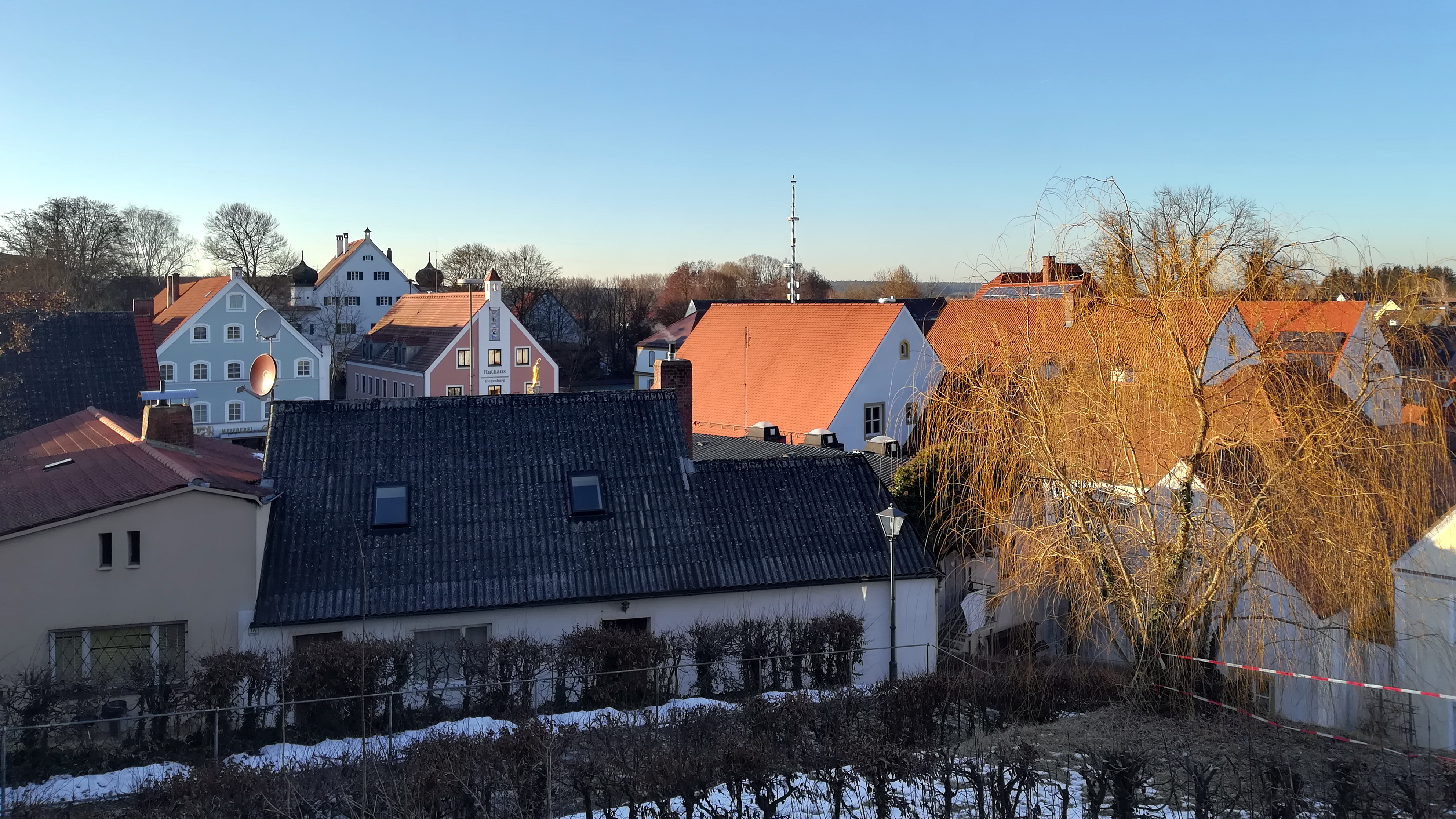 Siegenburg ist ein Markt im niederbayerischen Landkreis Kelheim und der Sitz der Verwaltungsgemeinschaft Siegenburg.